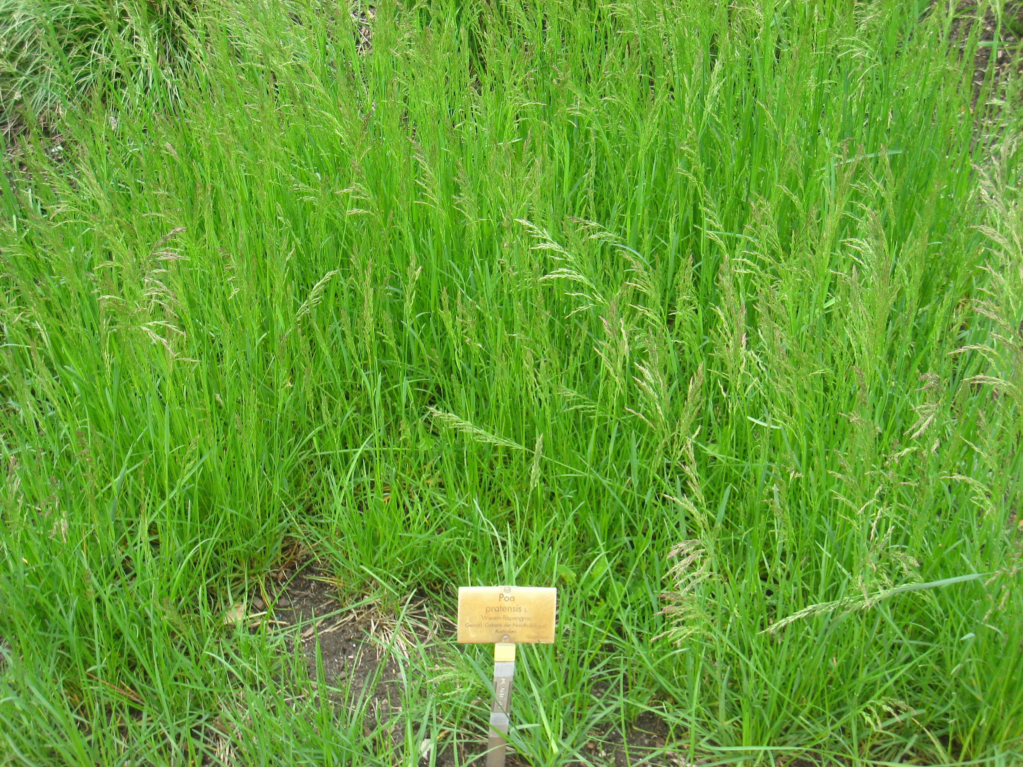 Poa pratensis specimen in the Botanischer Garten, Berlin-Dahlem (Berlin Botanical Garden), Berlin, Germany.